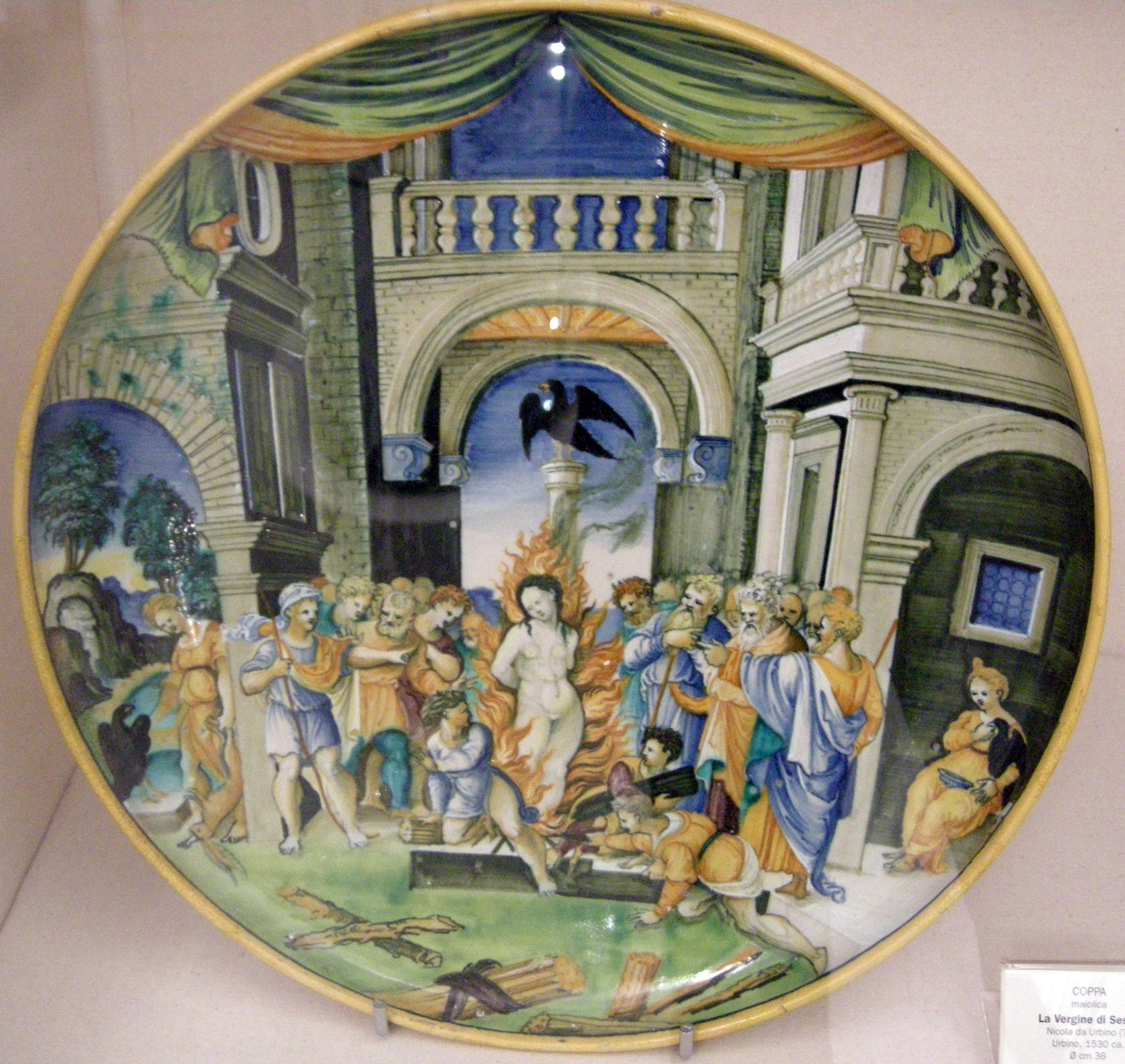 Museo Civico This is a photo of a monument which is part of cultural heritage of Italy.